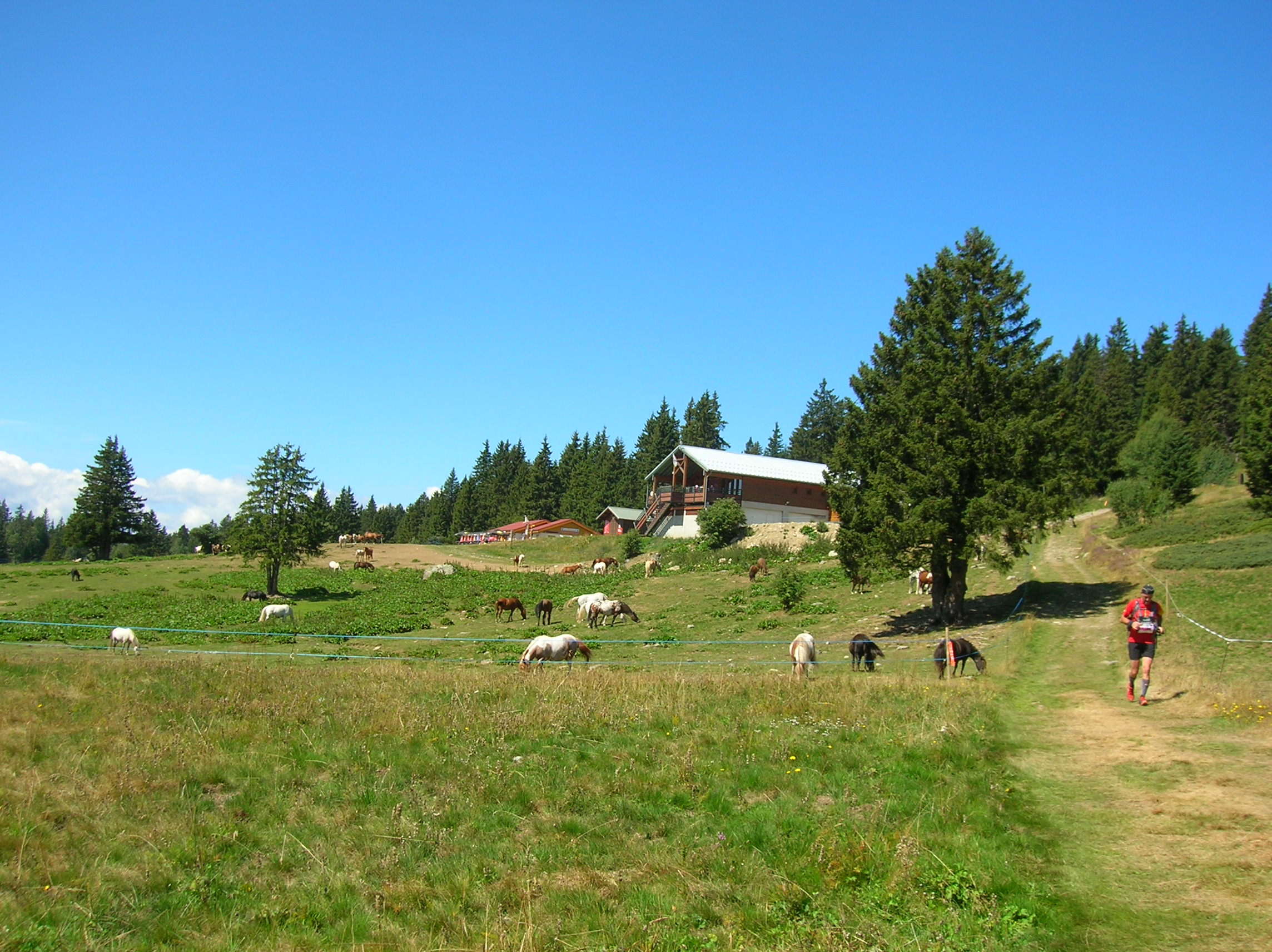 Chamrousse. Journée de l'Ultratour des 4 massifs (UT4M) à la Tourbière de l'Arselle (Espace naturel sensible). Chamrousse, Isère, AuRA, France.